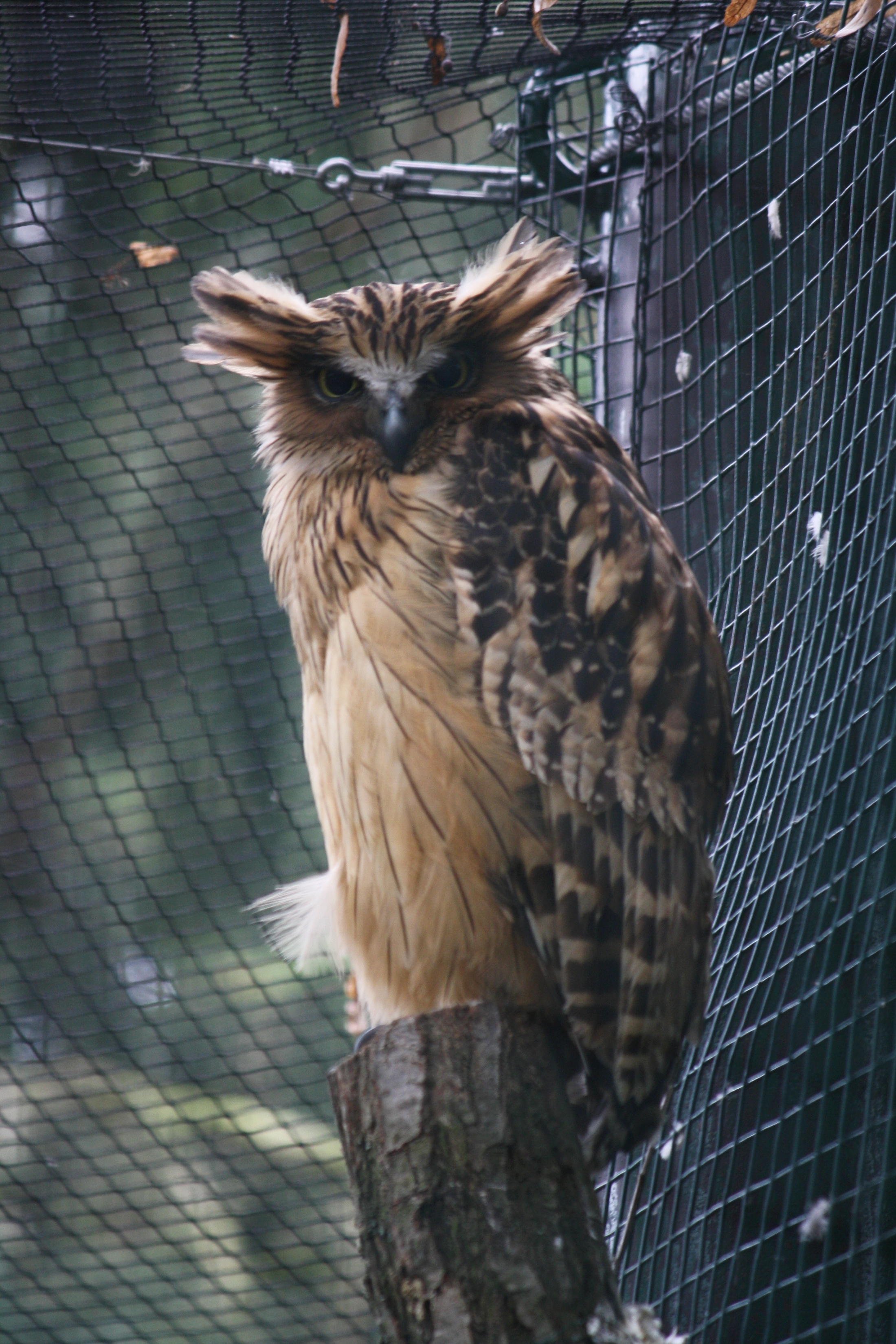 Zoo Praha